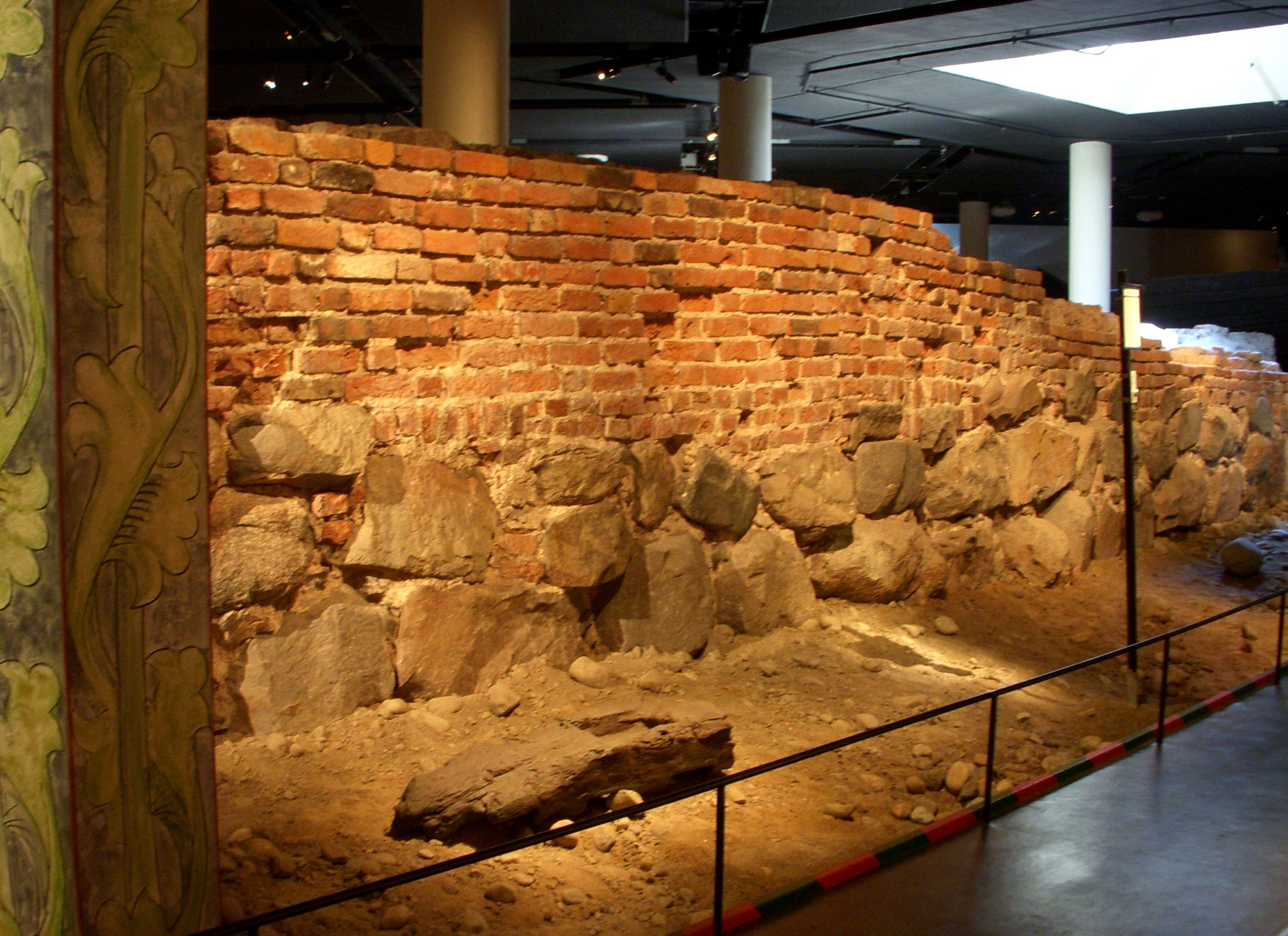 Stockholms stadsmur i Medeltidsmuseet